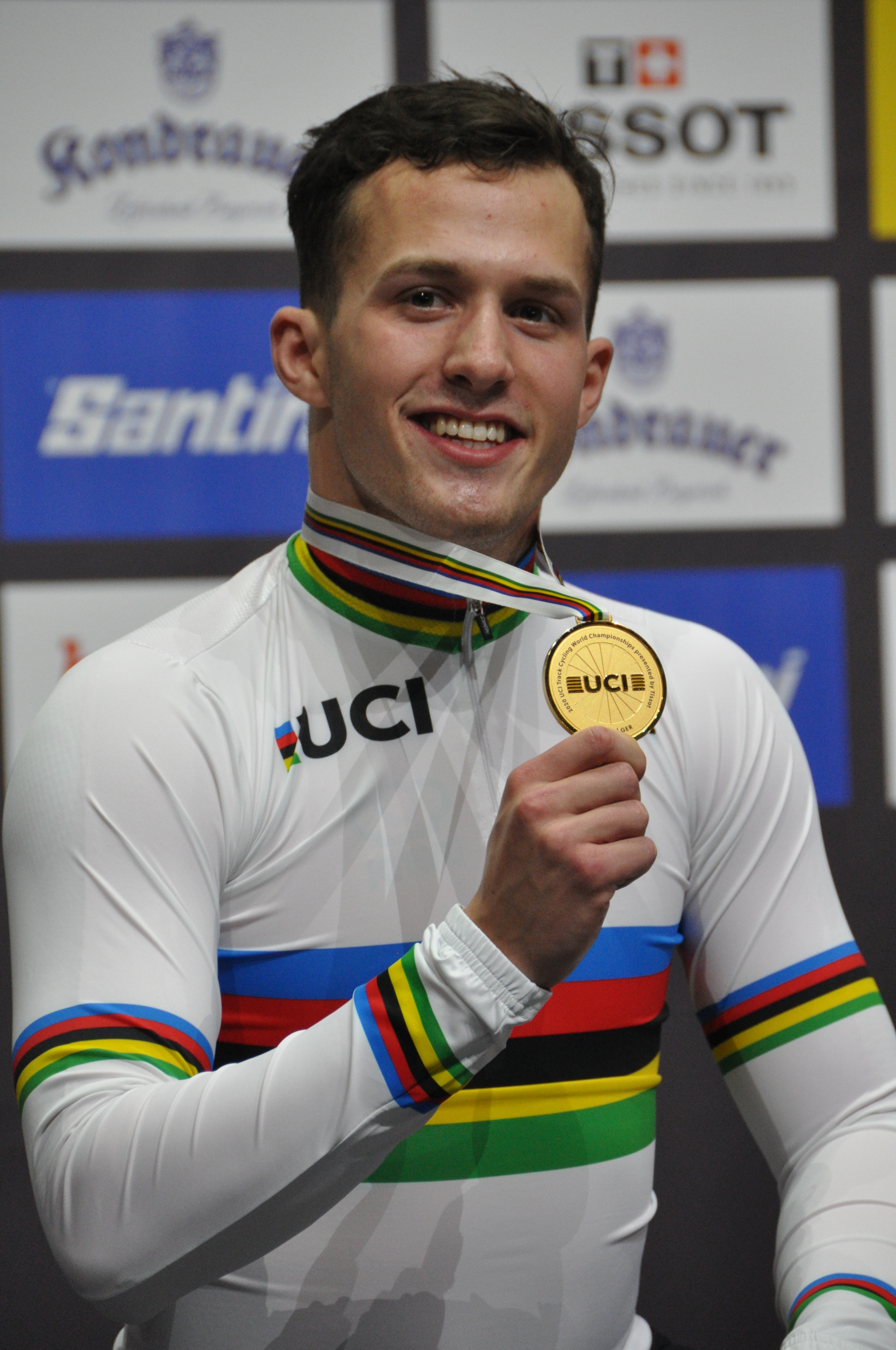 Sam Ligtlee, Weltmeister 2020 im 1000-Meter-Zeitfahren